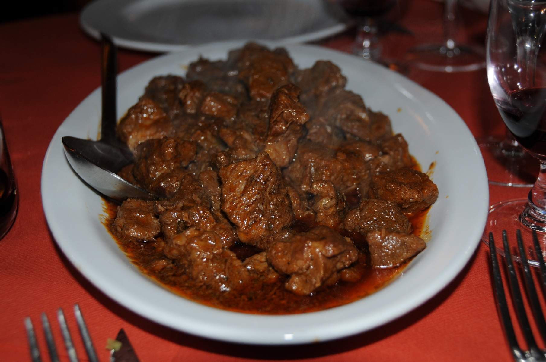 Cinta senese Wikimangia 4 - Castel del Piano